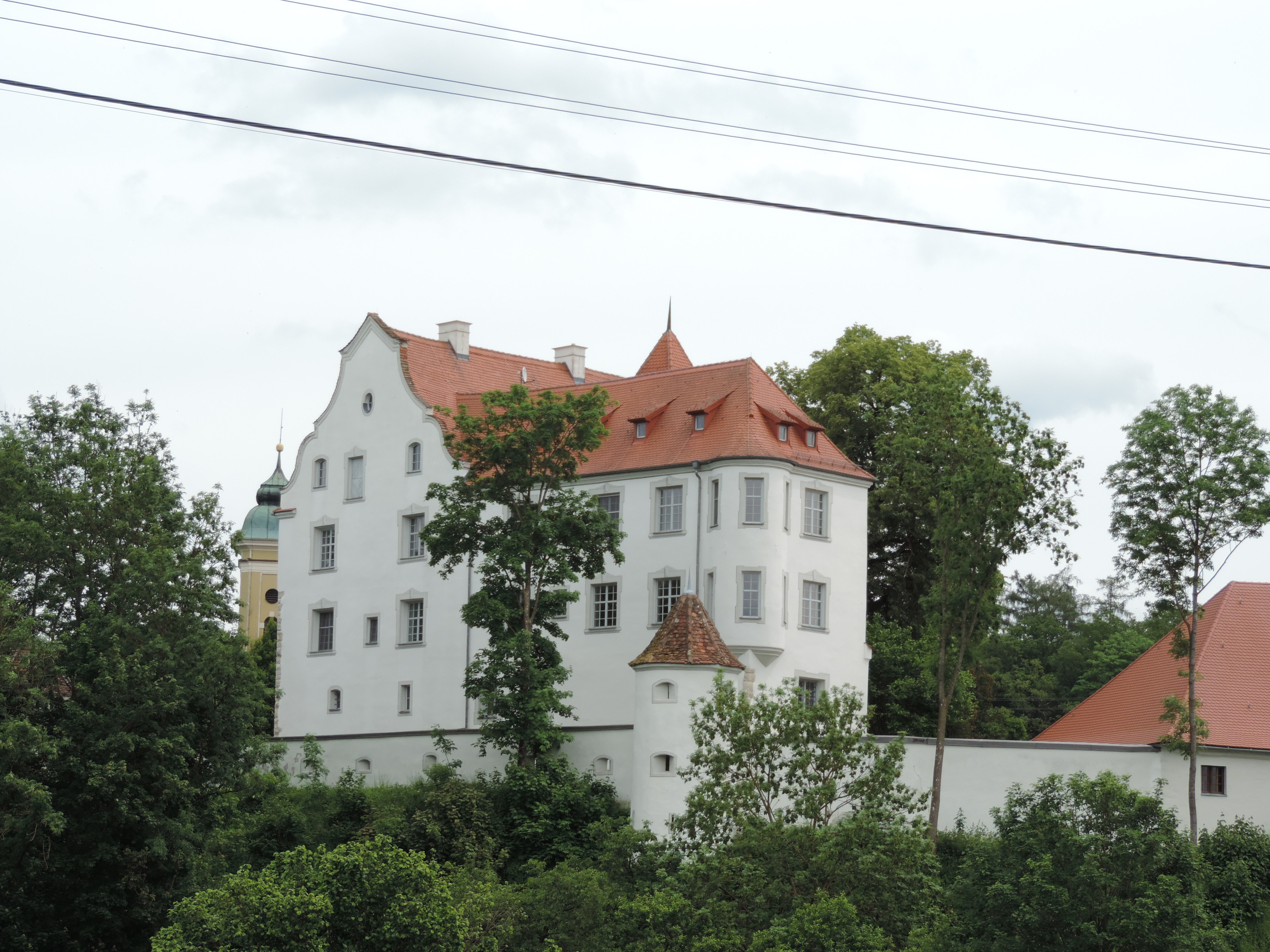 Stetten ob Lontal, Blick auf die Nordseite des Schlosses